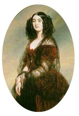 Графиня Юлия Павловна Самойлова (1803-1875)